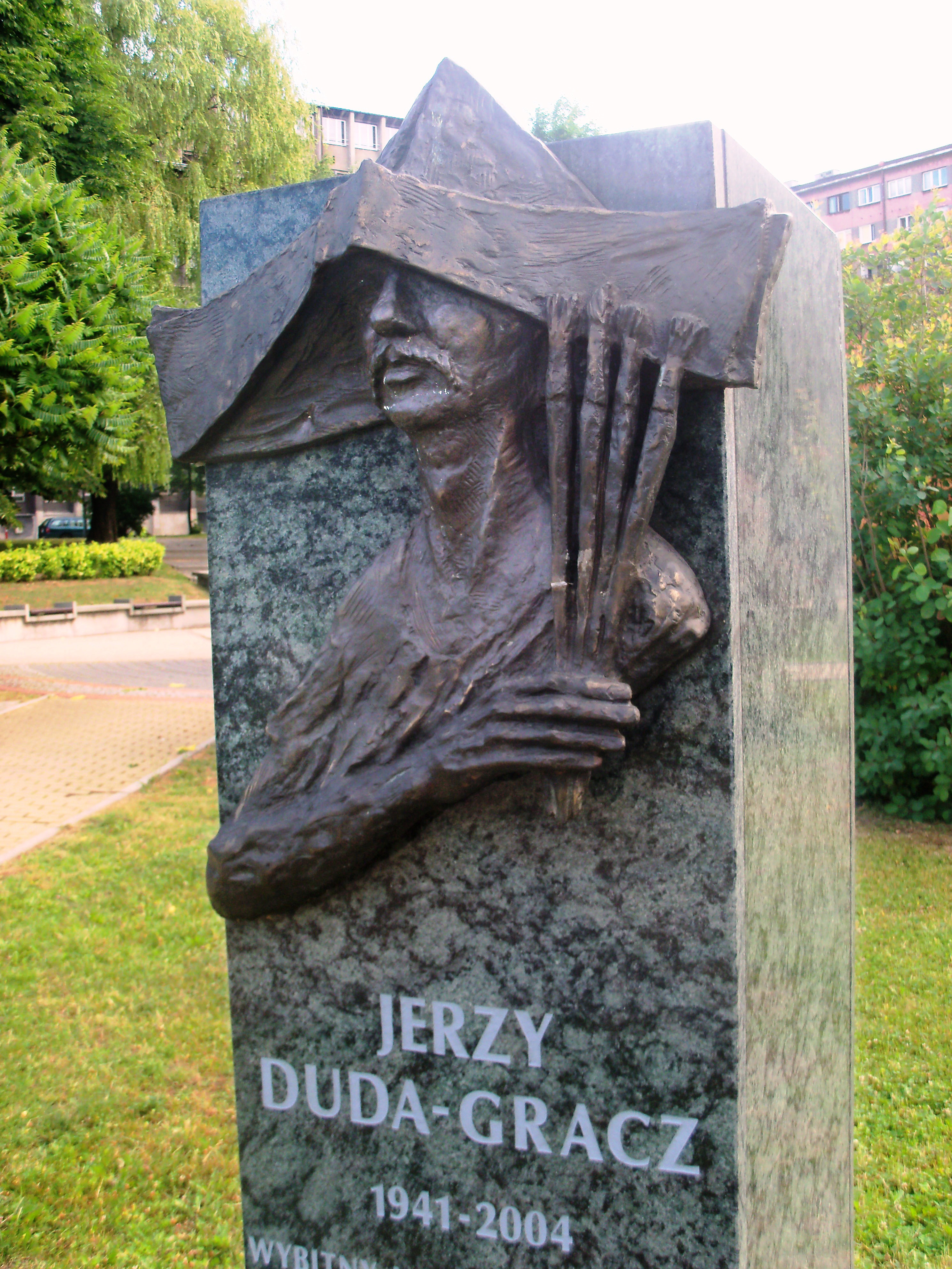 Galeria Artystyczna na placu Grunwaldzkim w Katowicach: Rzeźba przedstawiająca Jerzego Dudę-Gracza